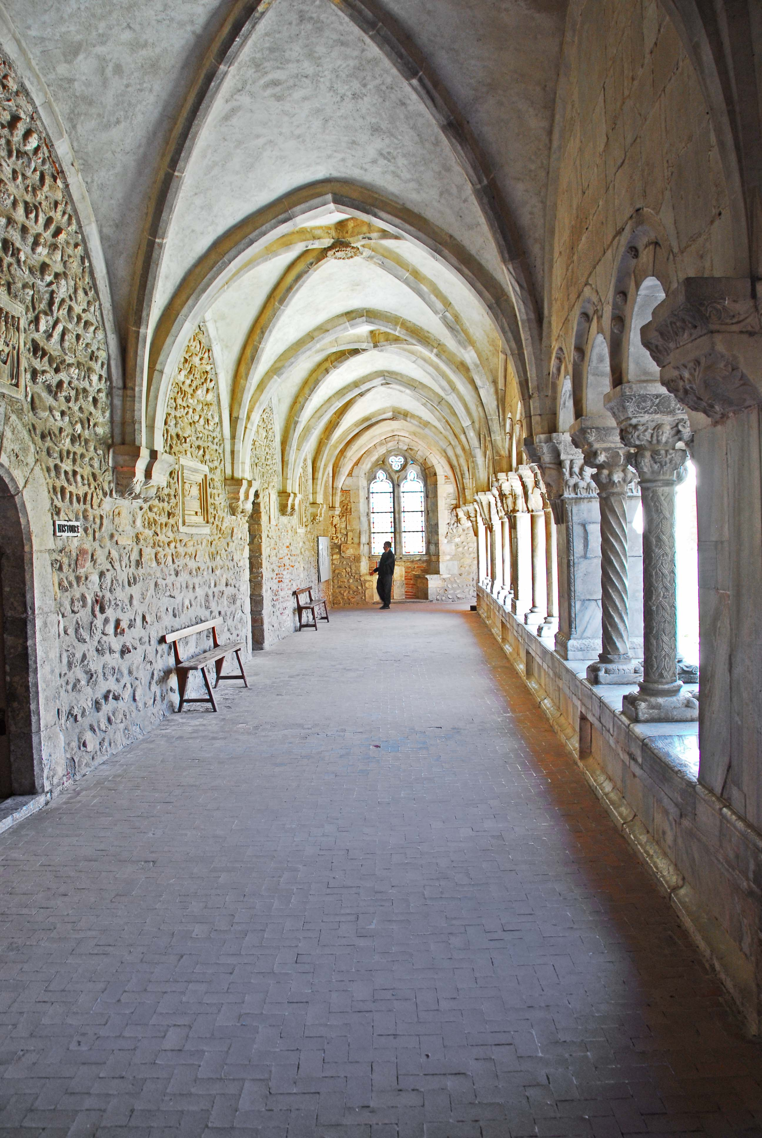 Kreuzgang, Westgalerie von Ste-Eulalie-et-Ste-Julie d’Elne